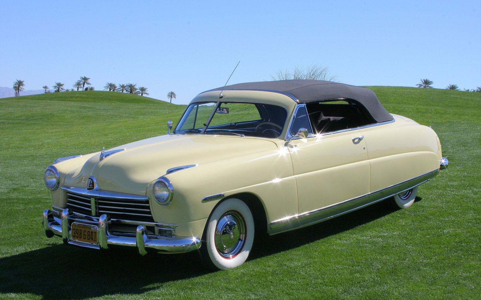 2011 Desert Classic, La Quinta, CA